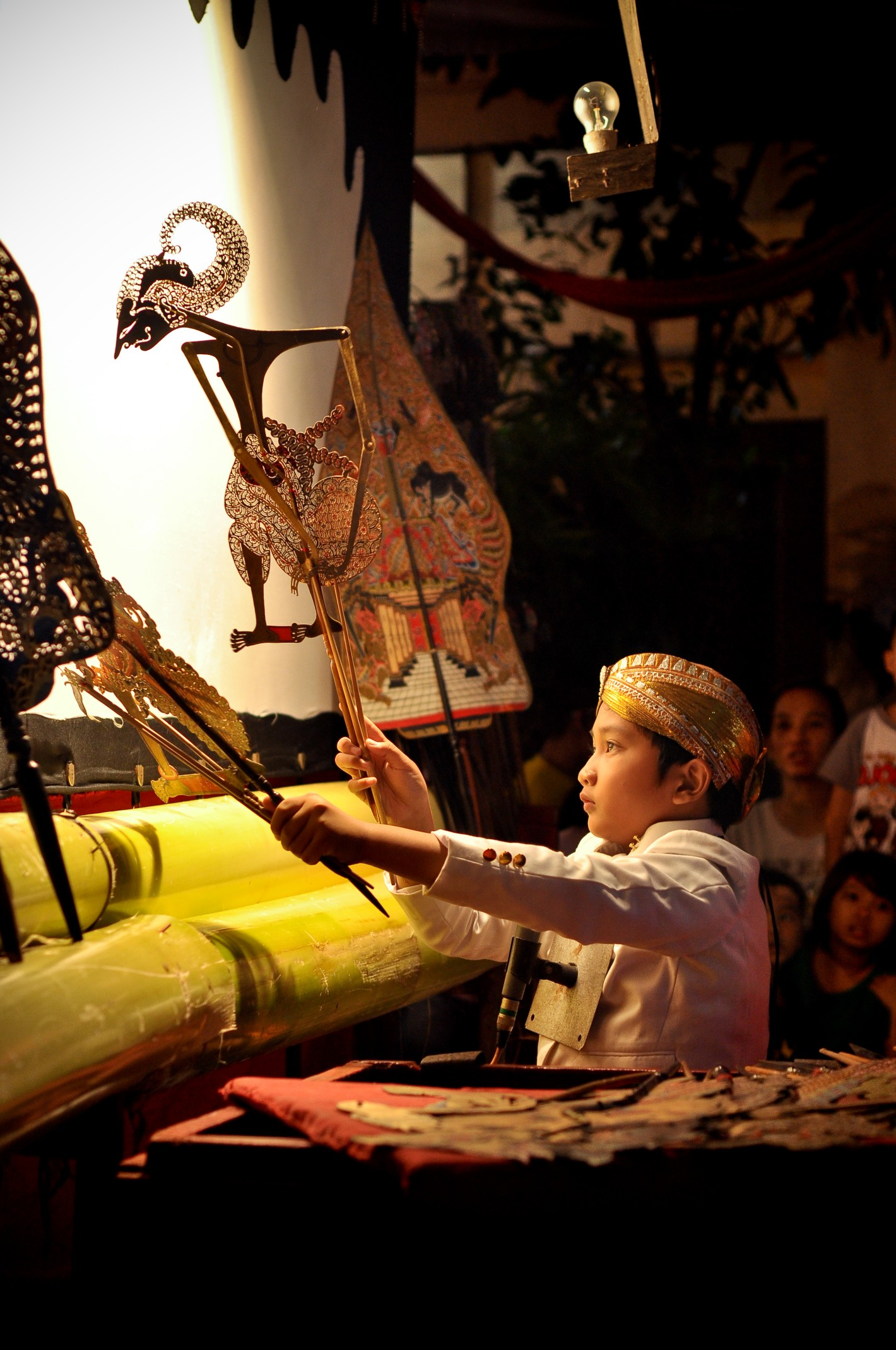 Dalang cilik yang sedang melakukan pertunjukan wayang kulit, ia memainkan tokoh wayang Arjuna di Pasar Malam Semawis, Semarang.